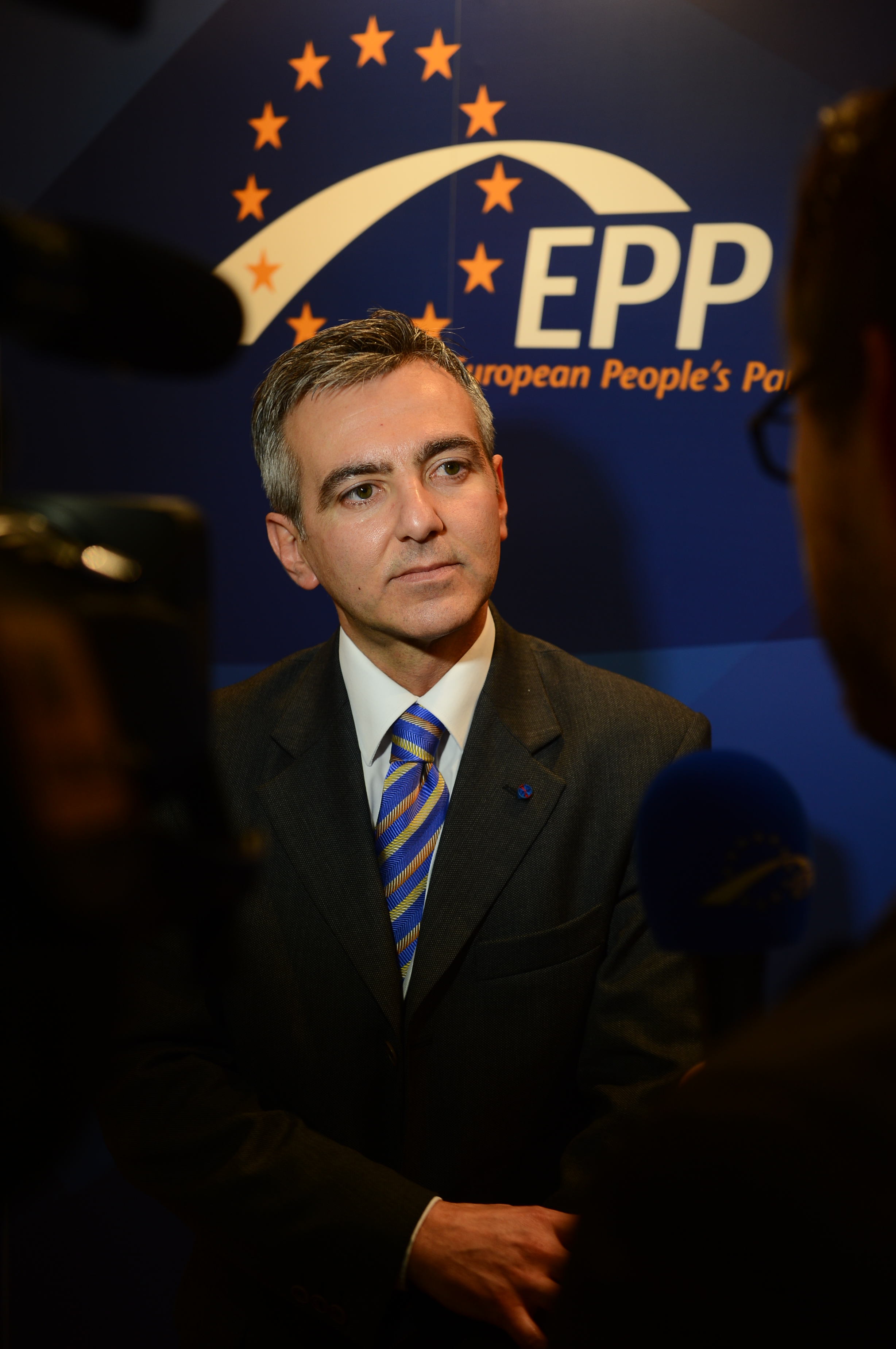 EPP Summit; Meise, Dec. 2013